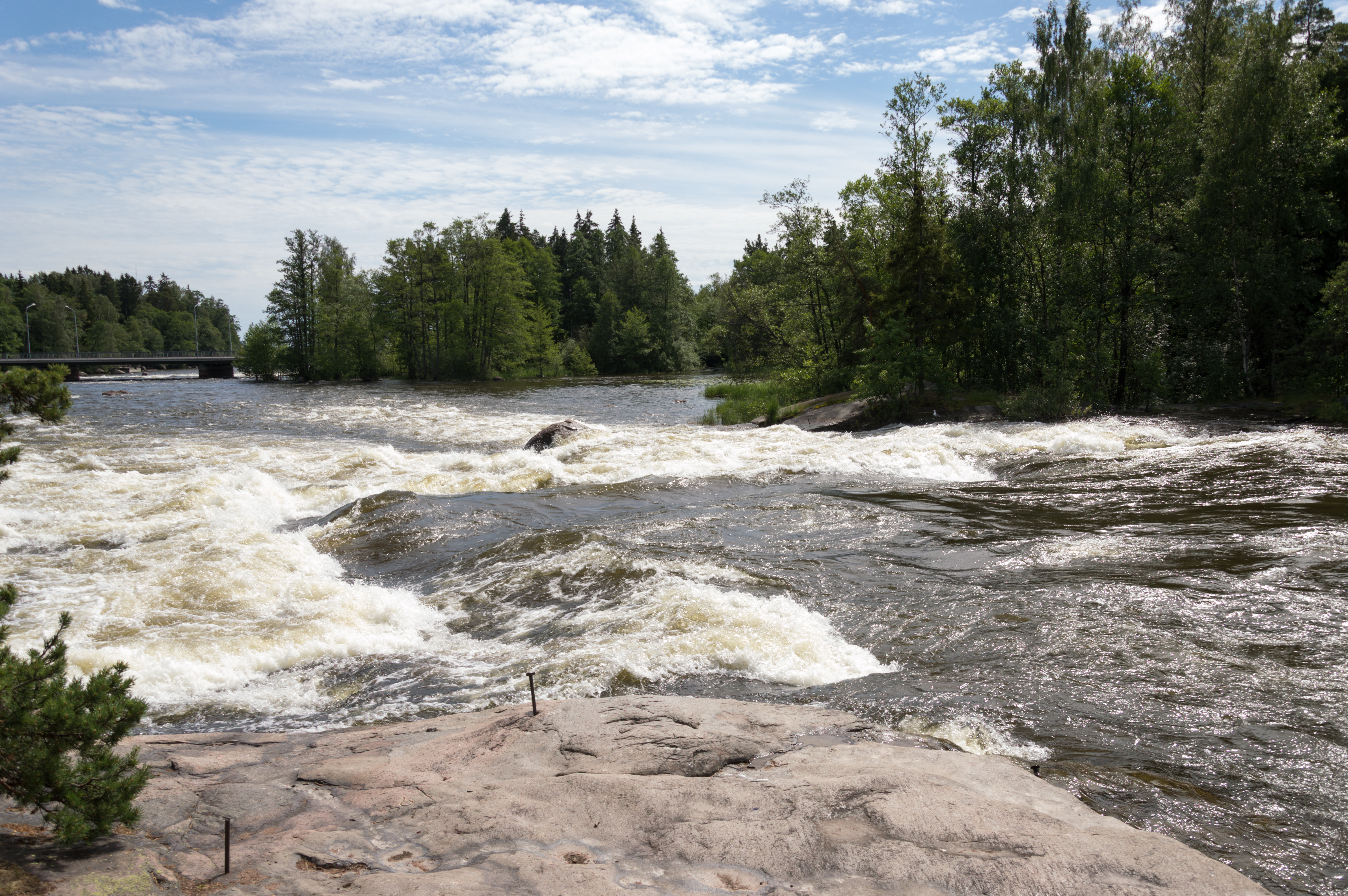 Langinkoski